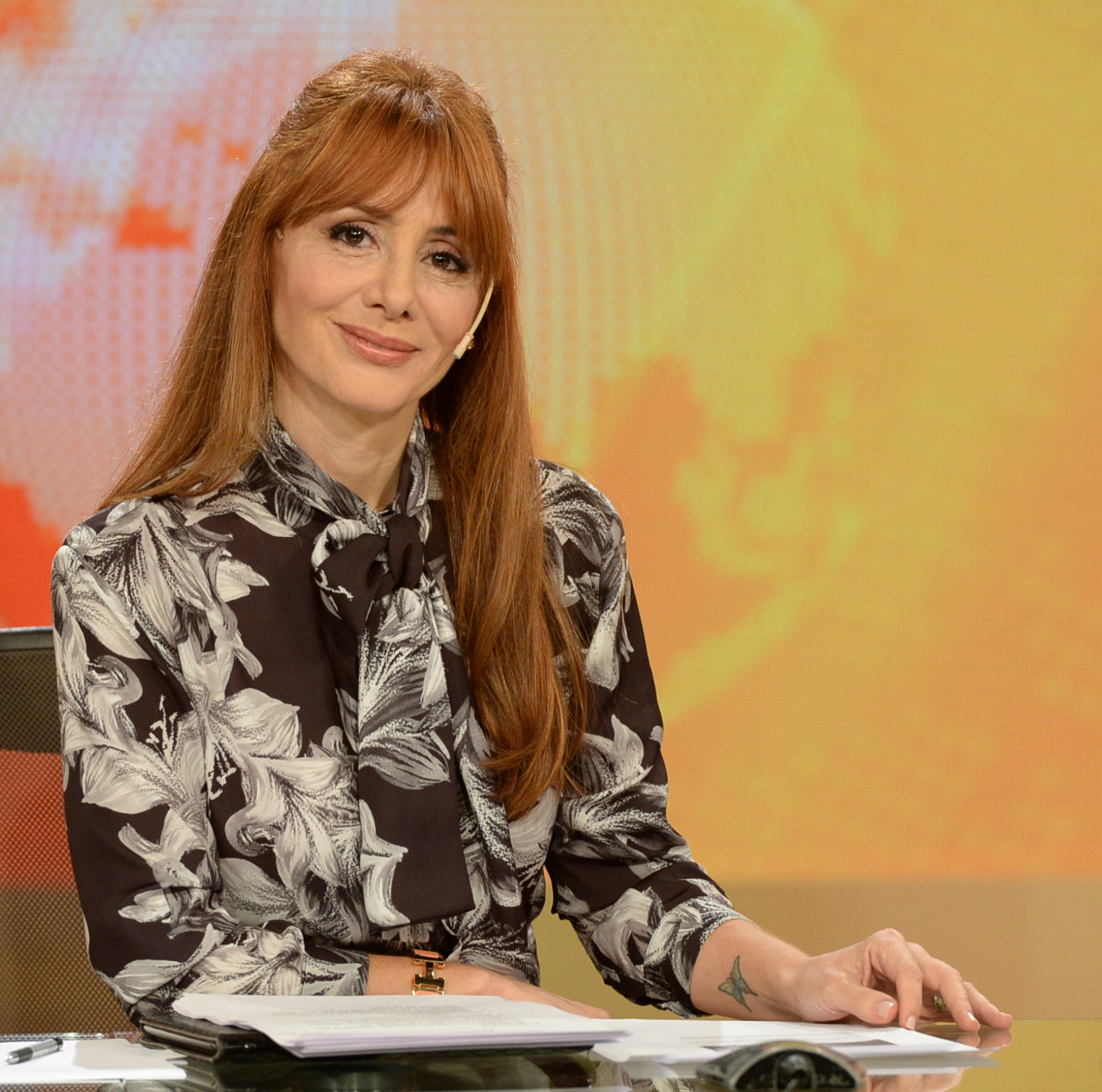 noticiero medio dia